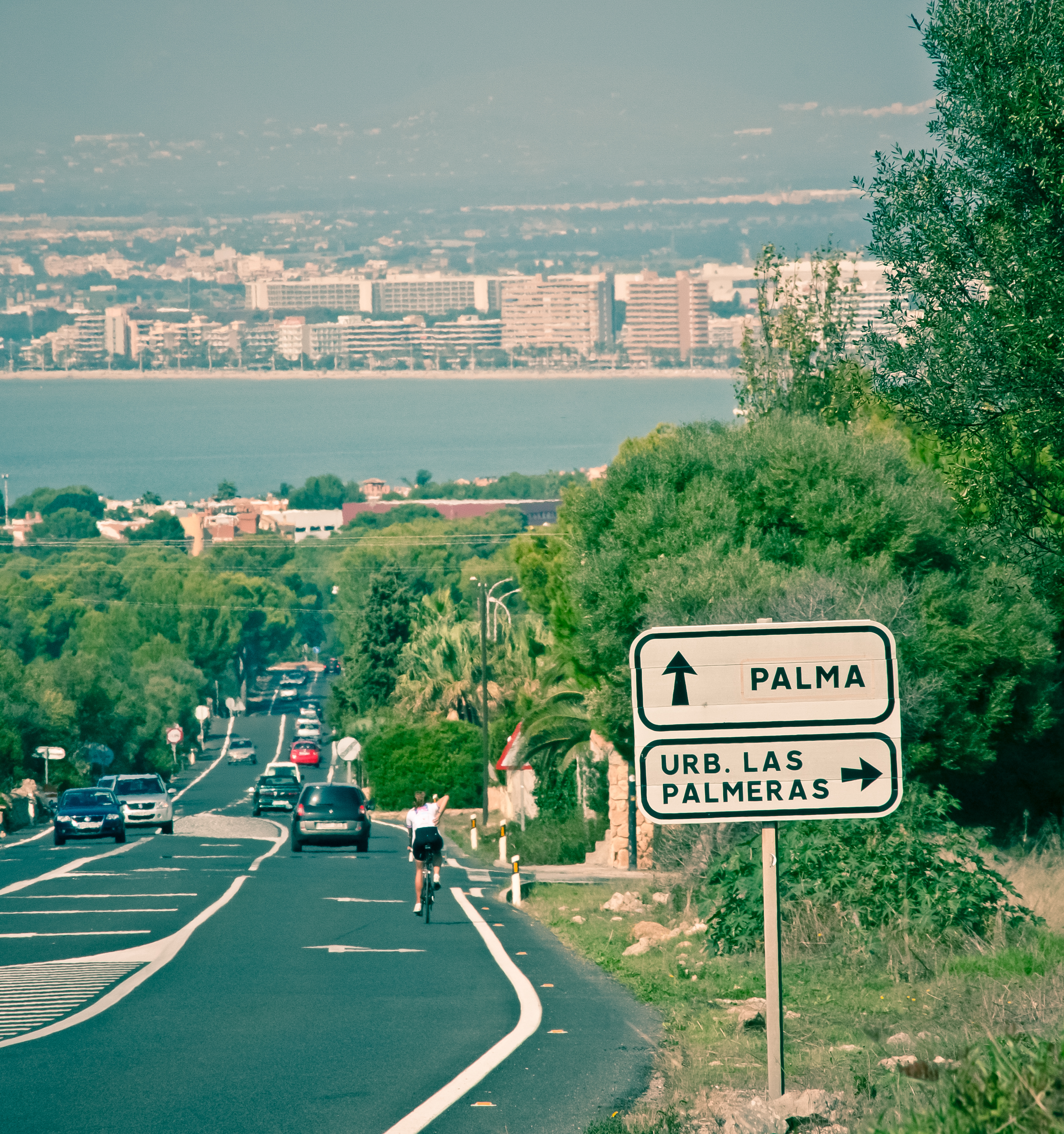 Intento de usar la flecha del cartel de Palma que indica la ciudad que vemos al fondo... mi ciudad :D